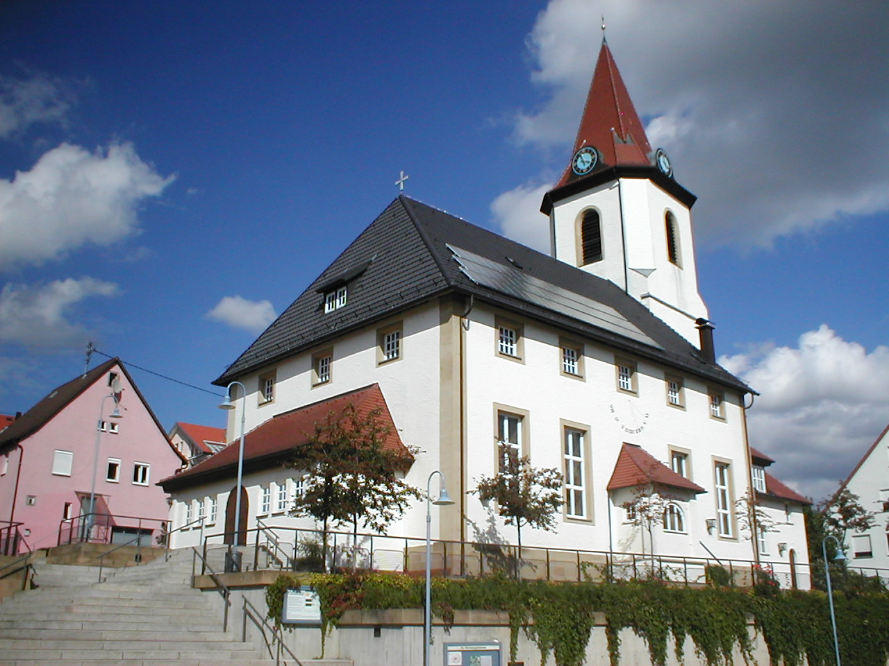 Evangelische Bartholomäuskirche in Nordheim. Vorgängerbauten niedergebrannt 1693, 1810, 1945. Renoviert 1989-91.